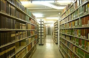 Der Hauptbestand der Bibliothek befindet sich im Magazin